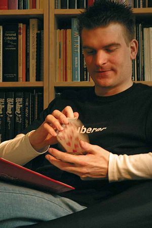 Denis Behr mit einem Karten-Flourish